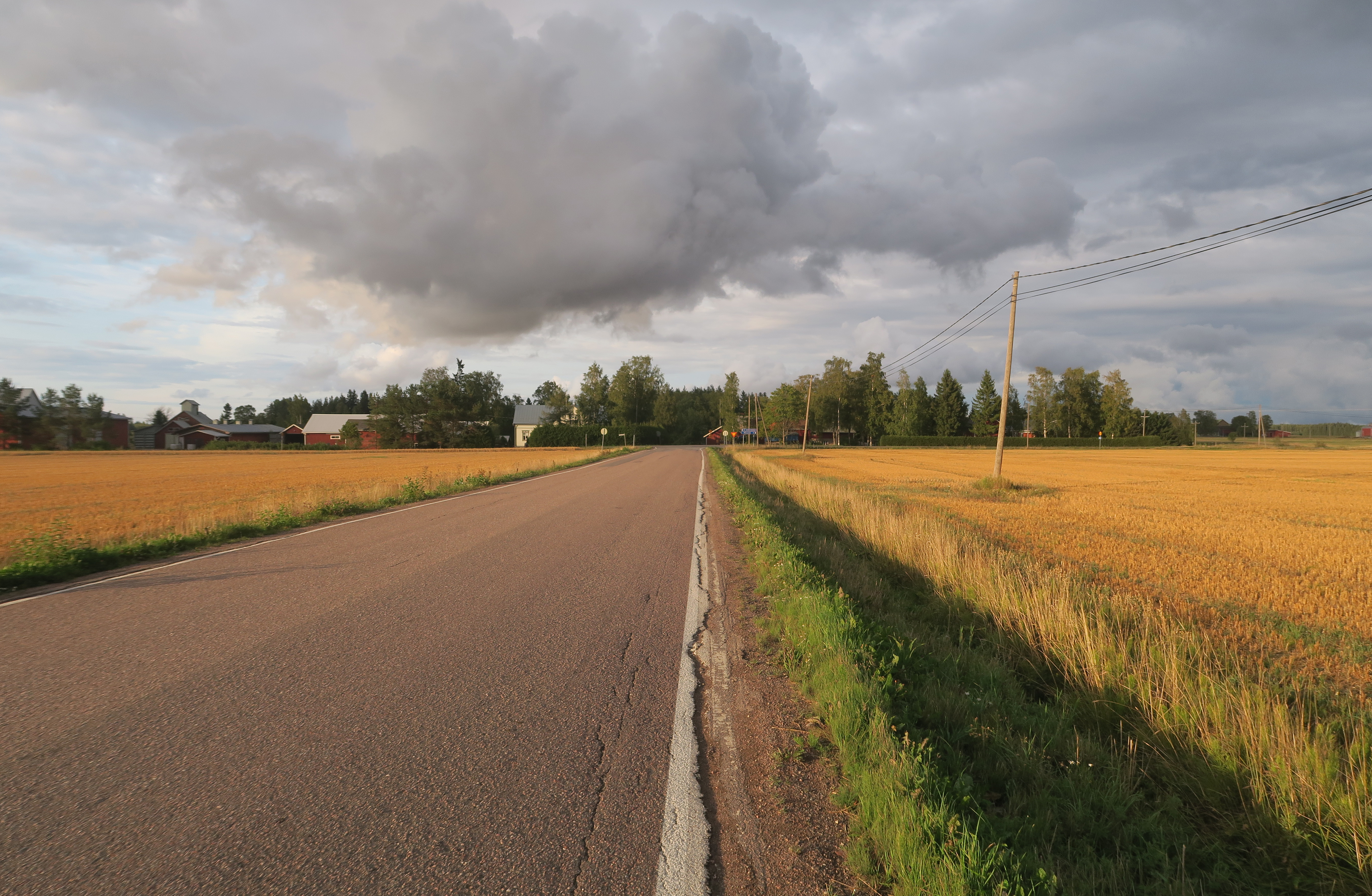 Huovintie (paikallistie 12579) Pappisten kylässä Loimaalla idän suuntaan elokuussa 2018.